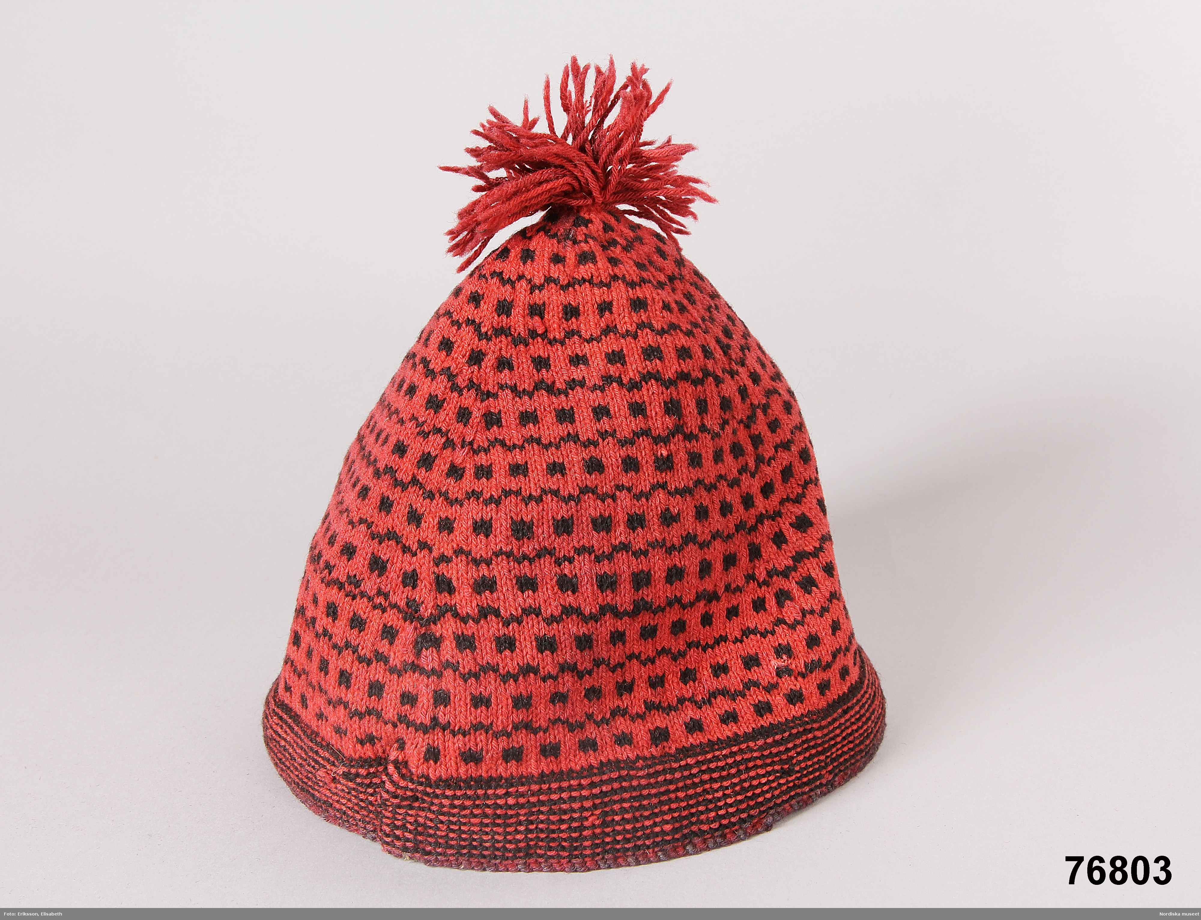 Stickmössa